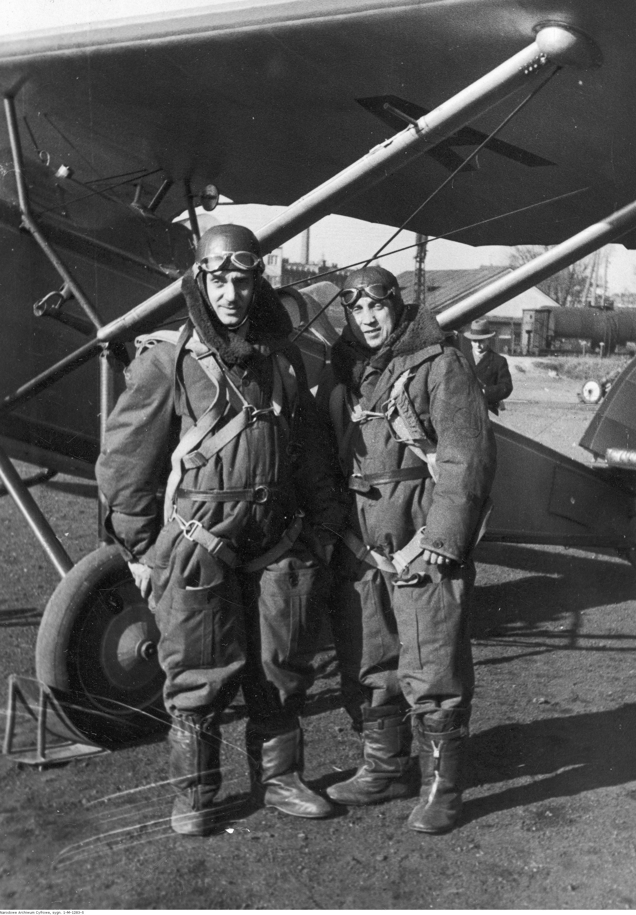 Odlot polskiej ekipy na Międzynarodowe Zawody Lotnicze w Bułgarii - przy samolocie Lublin R-XIII stoi dyrektor Polskich Linii Lotniczych LOT, mjr Wacław Makowski i ppłk Czesław Filipowicz.